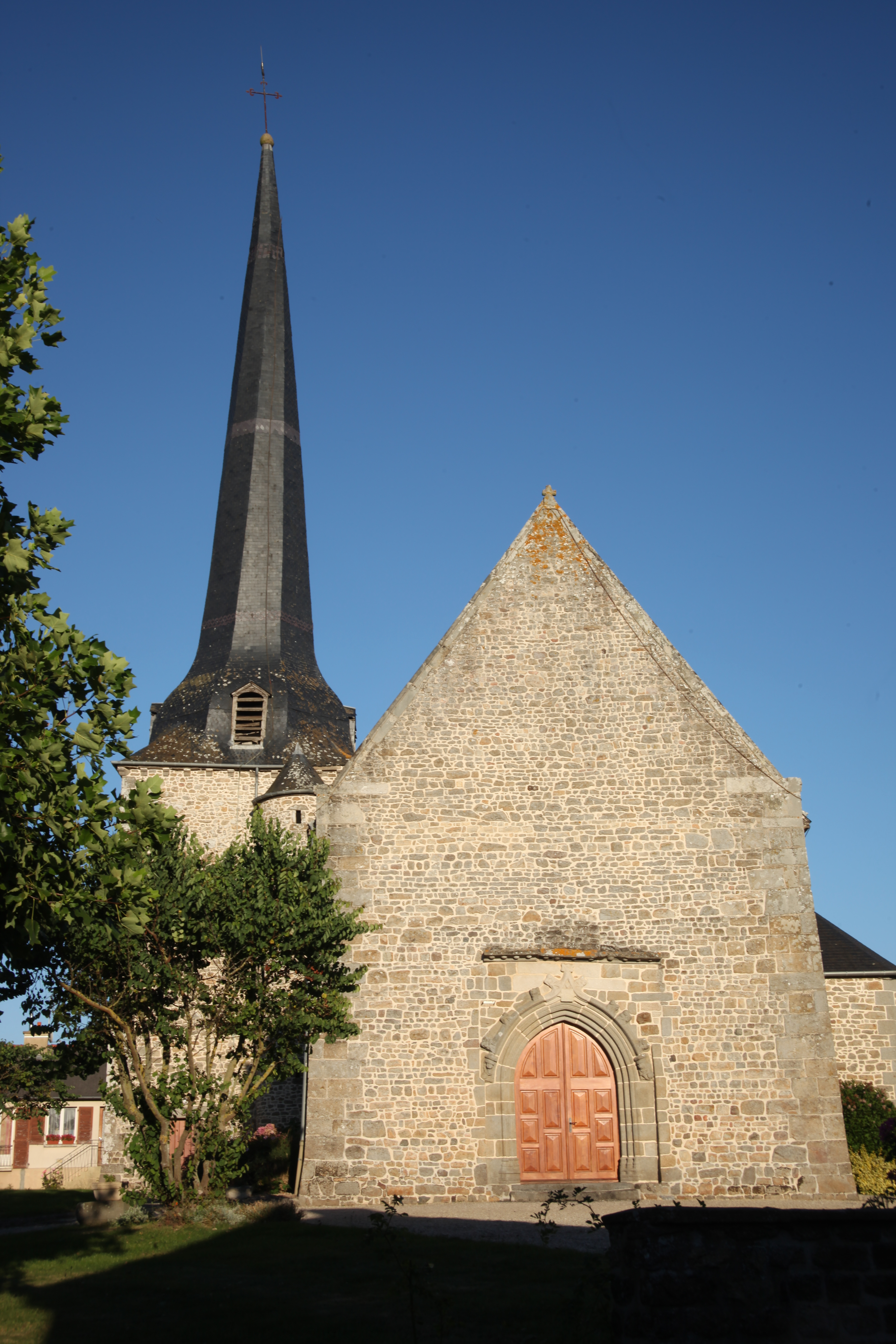 Eglise Saint-Pierre de Quebriac (face ouest)